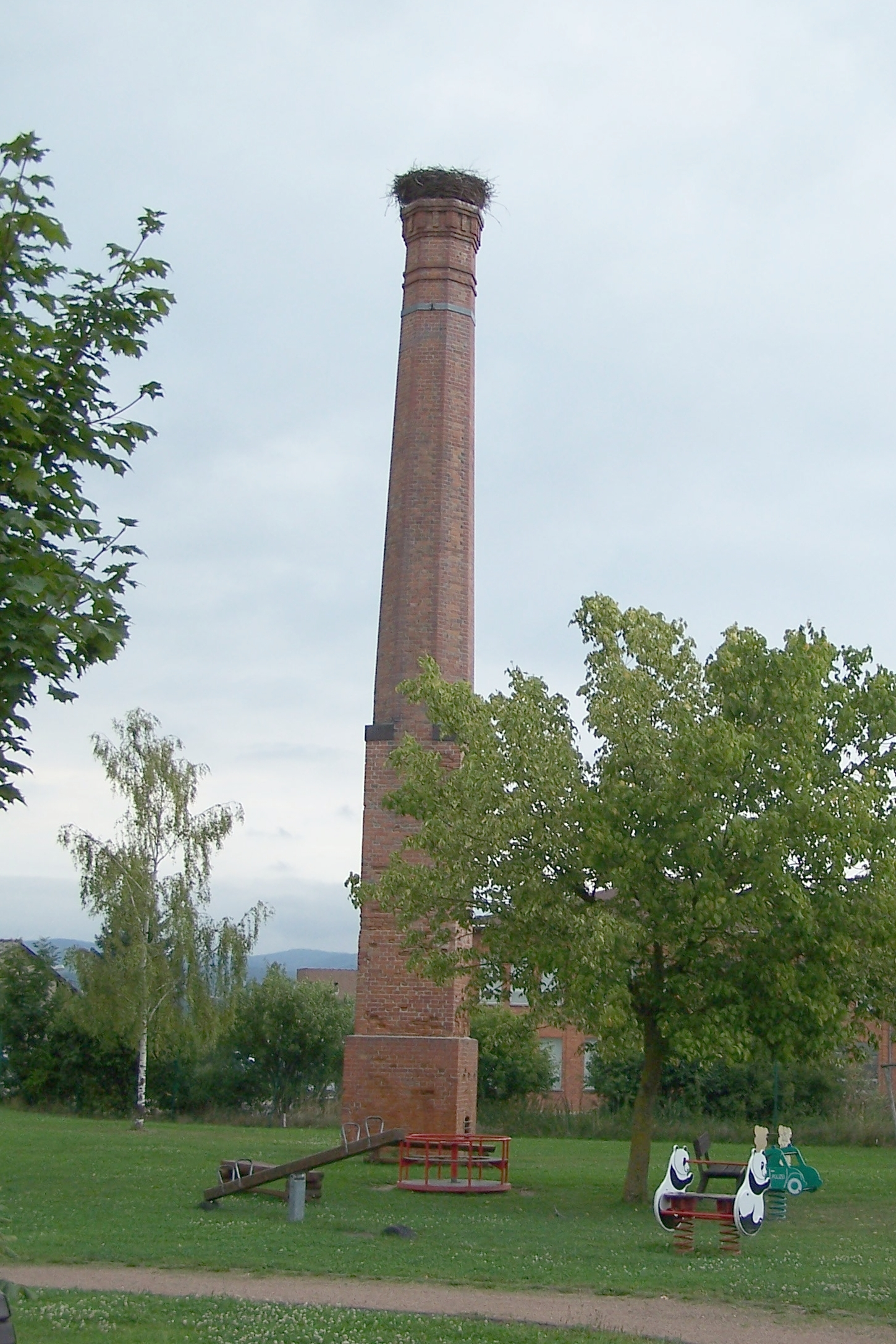 Ansichten und Details in Immelborn.